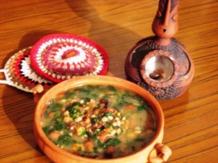 պահքի ծիսական կերակուր